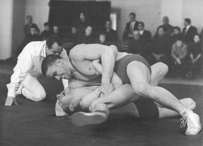 Rudolf Vesper, Gerd Dietze Zentralbild Kluge 28.4.1968 Leipzig: Deutsche Meisterschaften der DDR im Ringen (klassischer Stil) vom 26.-28.4.1968 in der Sporthalle Leplaystraße. Im Weltergewicht gewann der Titelverteidiger und Vize-Weltmeister Rudolf Vesper (Rostock, oben) in der II. Turnierrunde gegen Gerd Dietze (Rostock) durch Schultersieg nach 3:12 min.